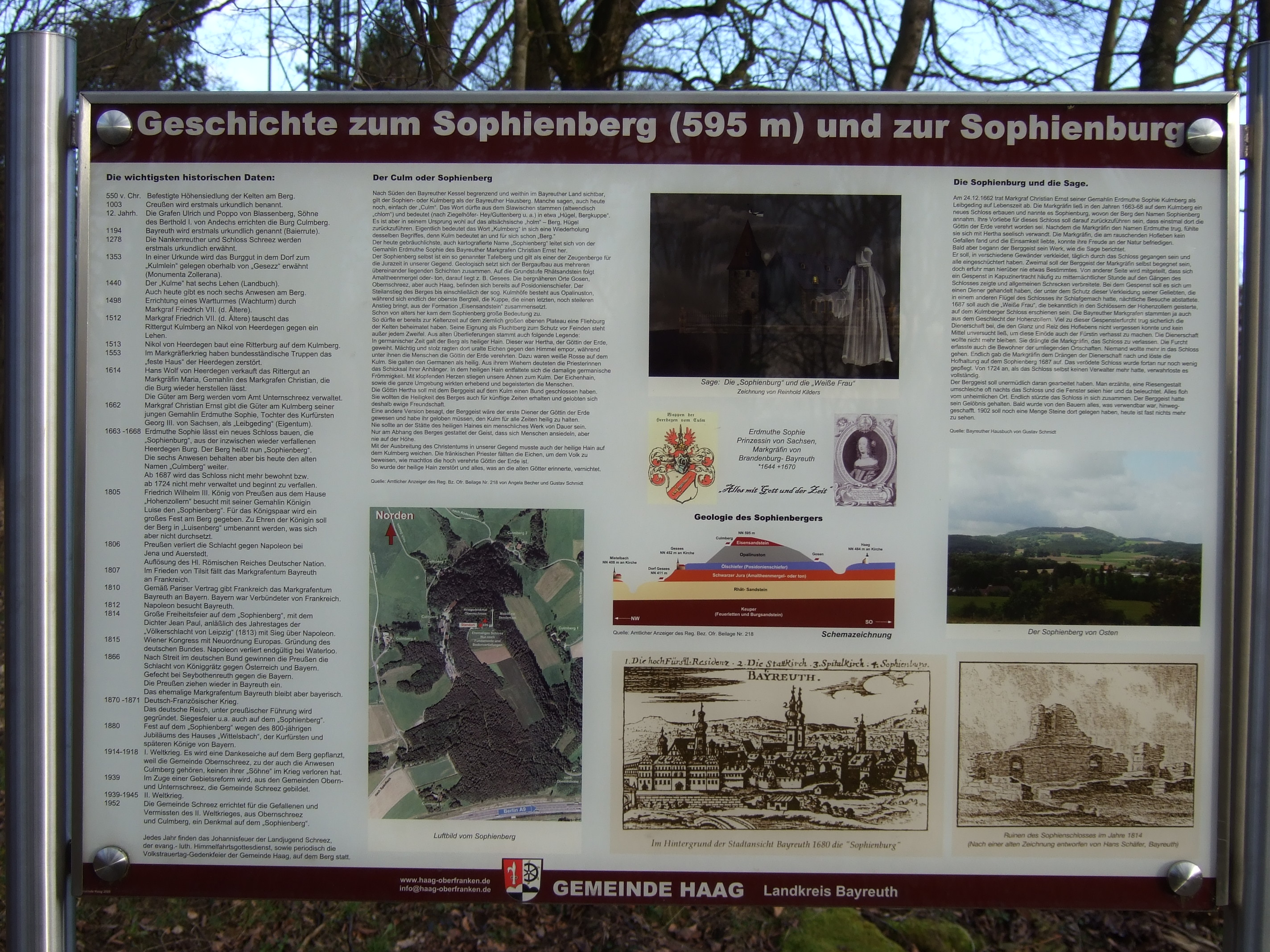 Infotafel auf dem Sophienberg